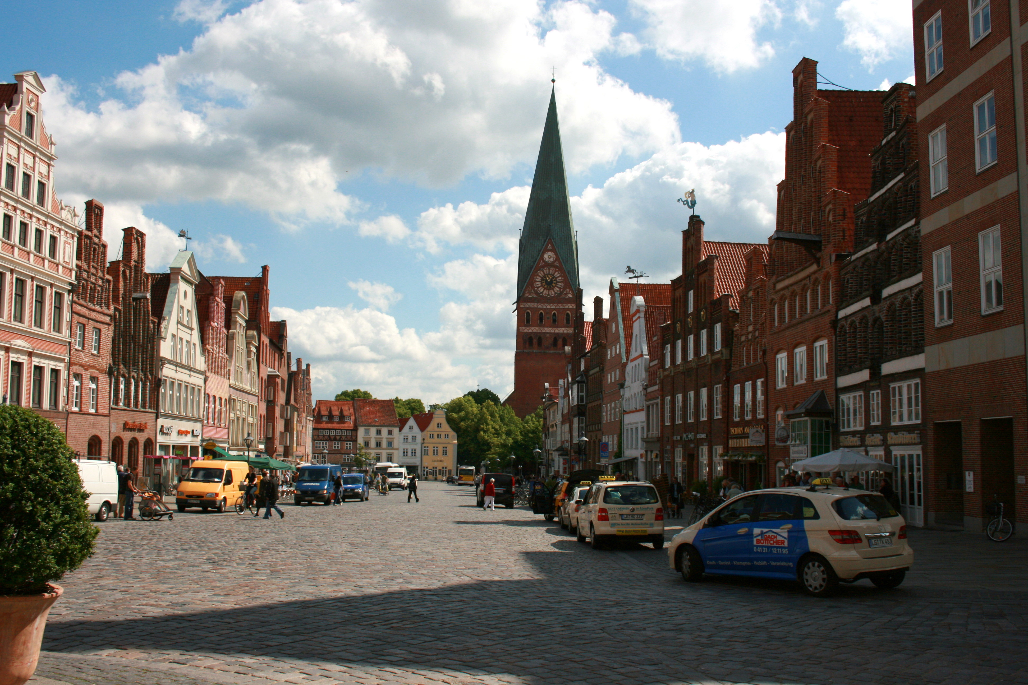 Am Sande in Lüneburg